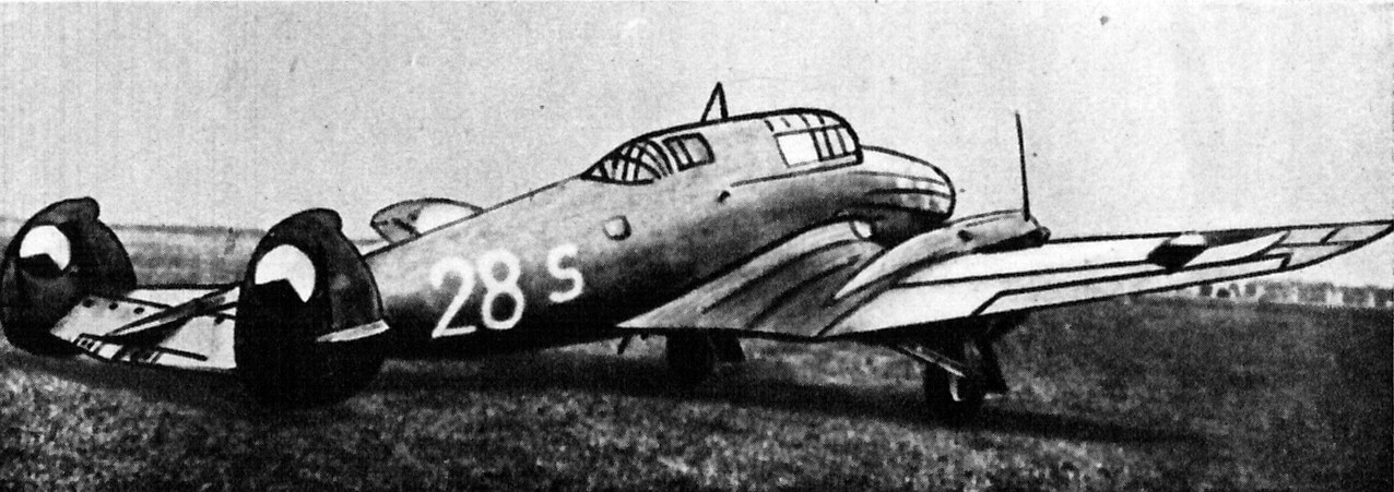 Czechosłowacki samolot rozpoznawczo-bombowy Avia B-158.